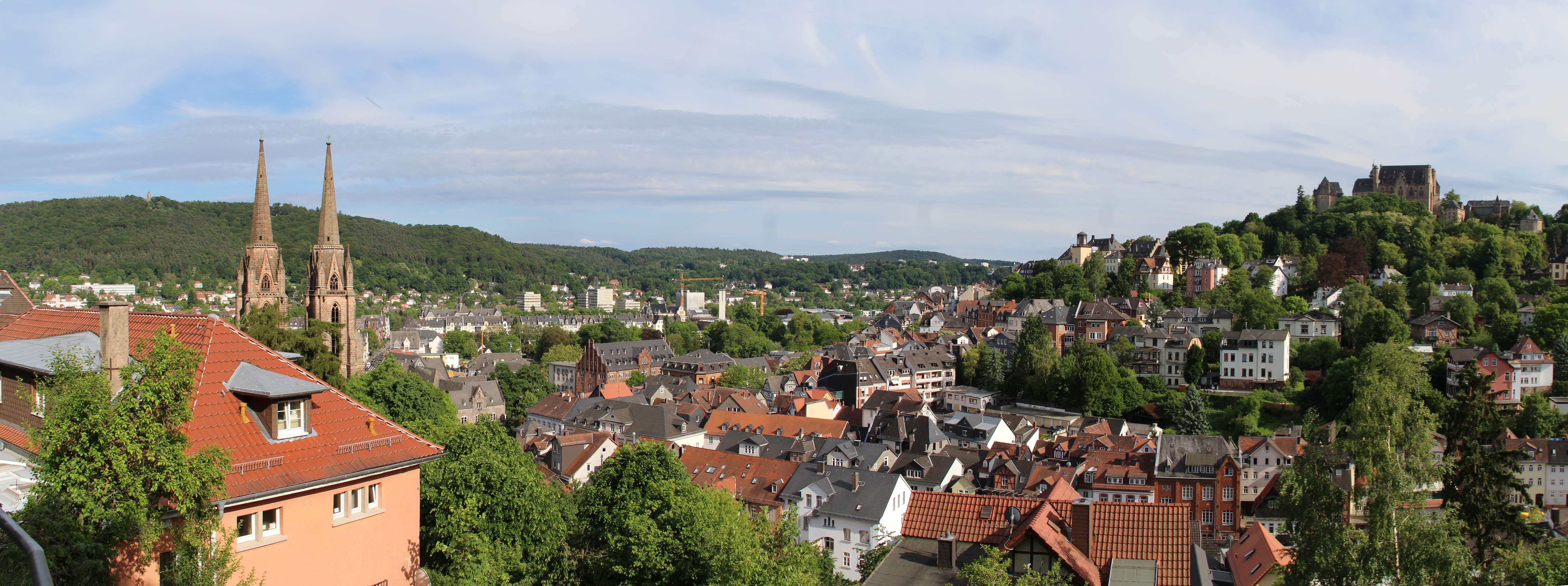 Panorama ins Ketzerbach- und Lahntal. Links die Elisabethkirche, rechts das Schloss, in der Mitte die neue Universitätsbibliothek in Marburg.